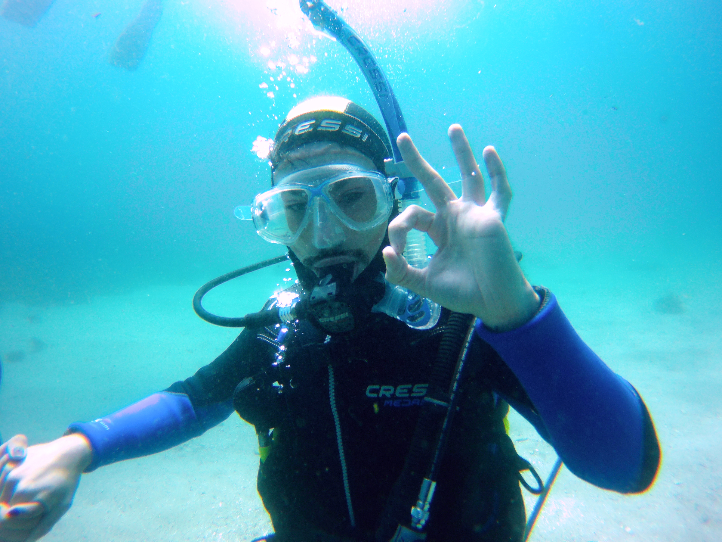 Buceador haciendo señal manual de OK